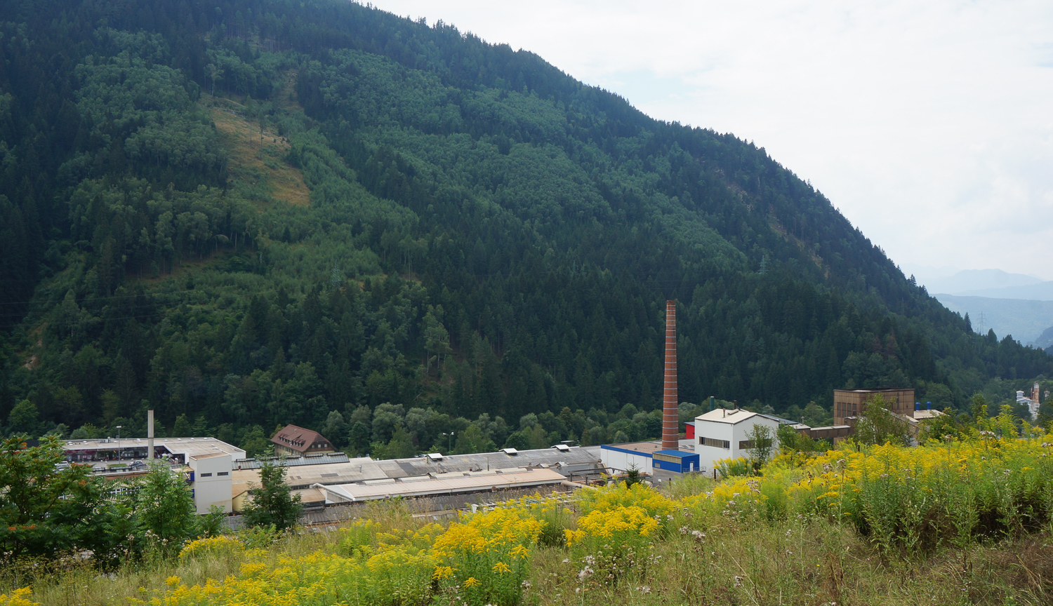 RHI Magnesita Bergbau, Werk in Radenthein, Kärnten, Österreich, Europäische Union